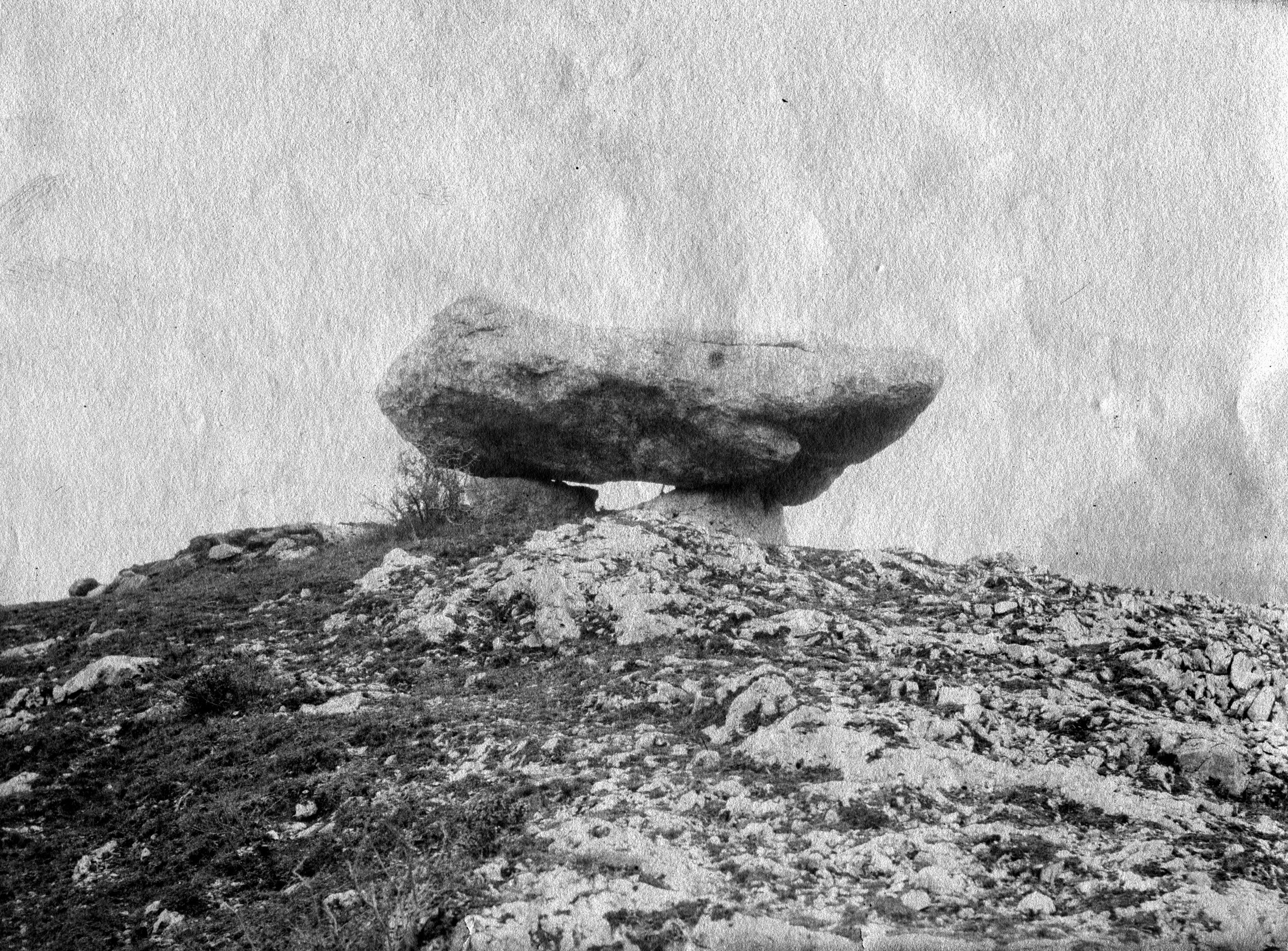 Fonds Trutat - Photographie ancienne Lieu de création : Vicdessos (Ariège ; canton) Observations : Notes manuscrites Trutat : "hémisph[érique] rapide ; papier Morgan ; B 229 ; congrès géologique". Mot(s)-clé(s) : -- Montagne -- Versant rocheux -- Bloc (roche) -- Végétation -- Automne -- Congrès [Mention / citation] -- Géologie [Mention / citation] -- Vicdessos (Ariège ; canton) -- Vicdessos (France ; vallée) -- Pyrénées (France) -- 19e siècle, 4e quart